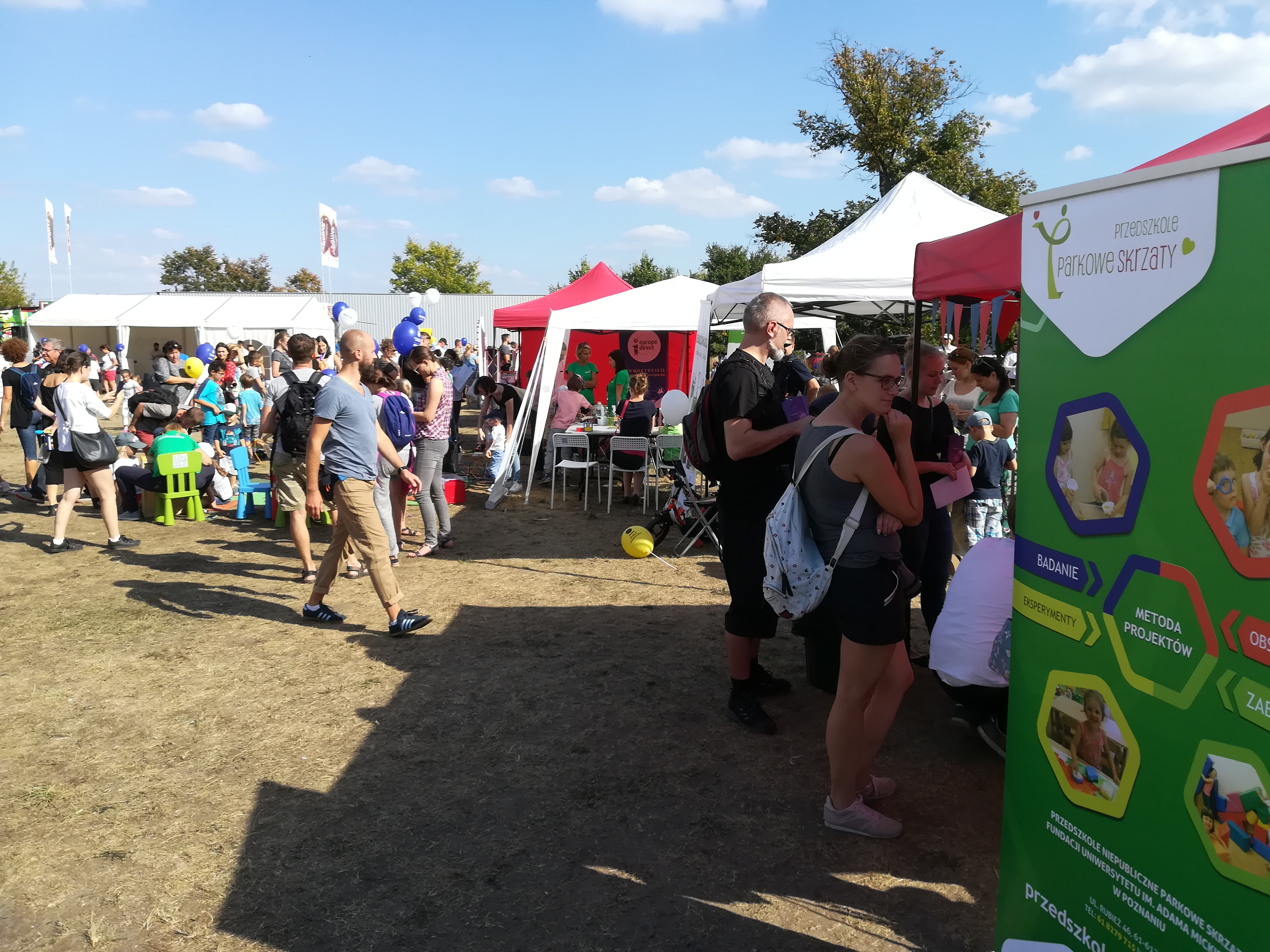 Impreza w Parku Naukowo-Technologicznym w Poznaniu na Rubieży (2018).